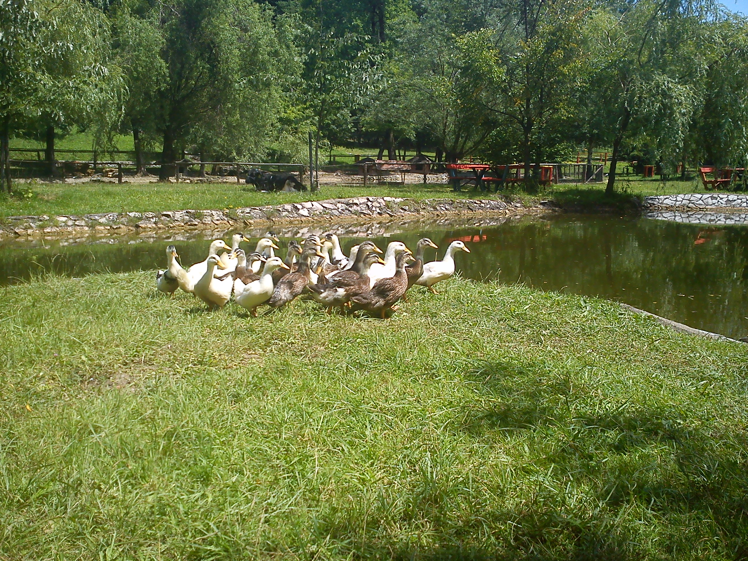 Патке у ЗОО врту Бања Лука